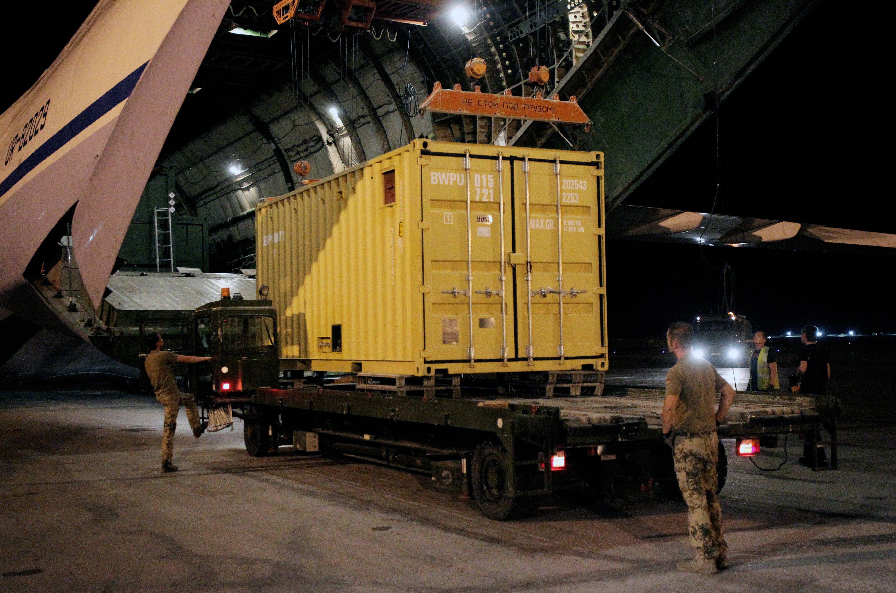 Internationale Sicherheitsunterstützungstruppe, kurz ISAF (International Security Assistance Force), in Afghanistan. 29.Deutsches Einsatzkontingent, RC North. Im Bild zu sehen: Eine Antonov wird kurz nach ihrer Ankunft nachts im Camp Marmal entladen. Foto: Sebastian Wilke/Bundeswehr.